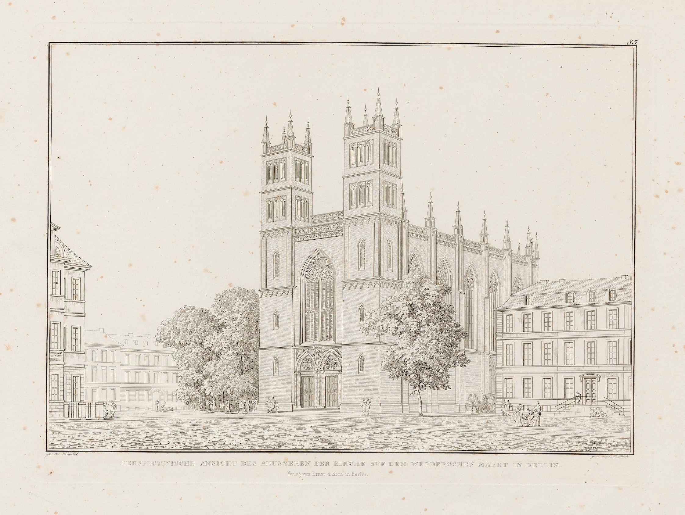 Friedrichswerdersche Kirche Berlin, Ansicht von Schinkel